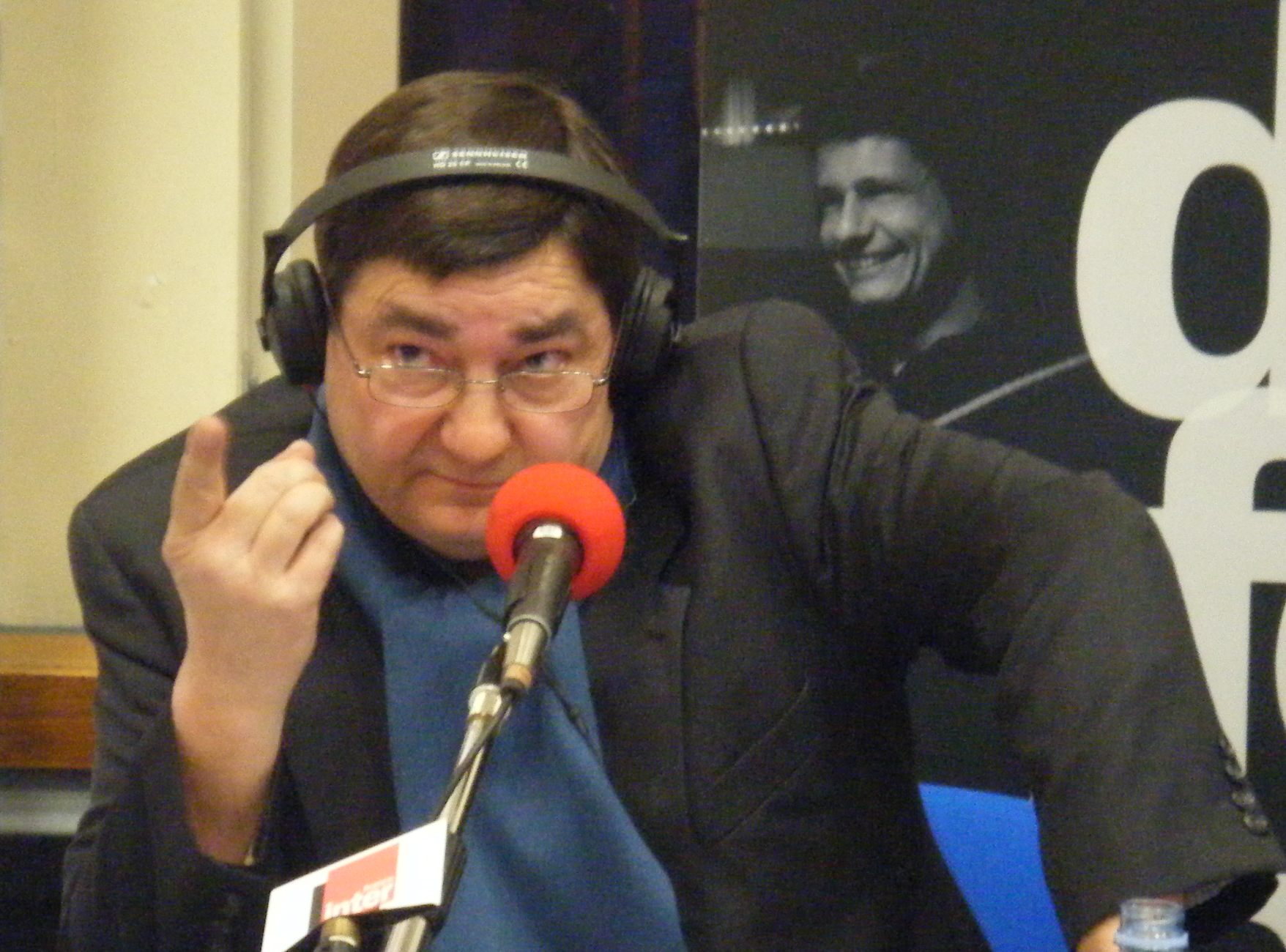 Alain Bédouet animant Le téléphone sonne sur France Inter en direct de l'Institut d'études politiques de Toulouse le 5 mars 2008.